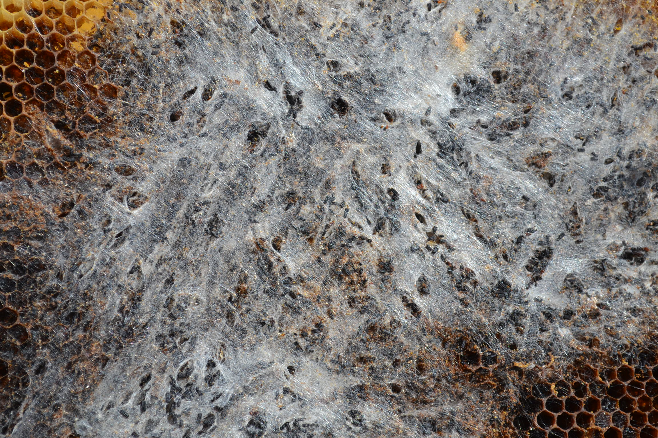 Gesinst der Wachsmotte